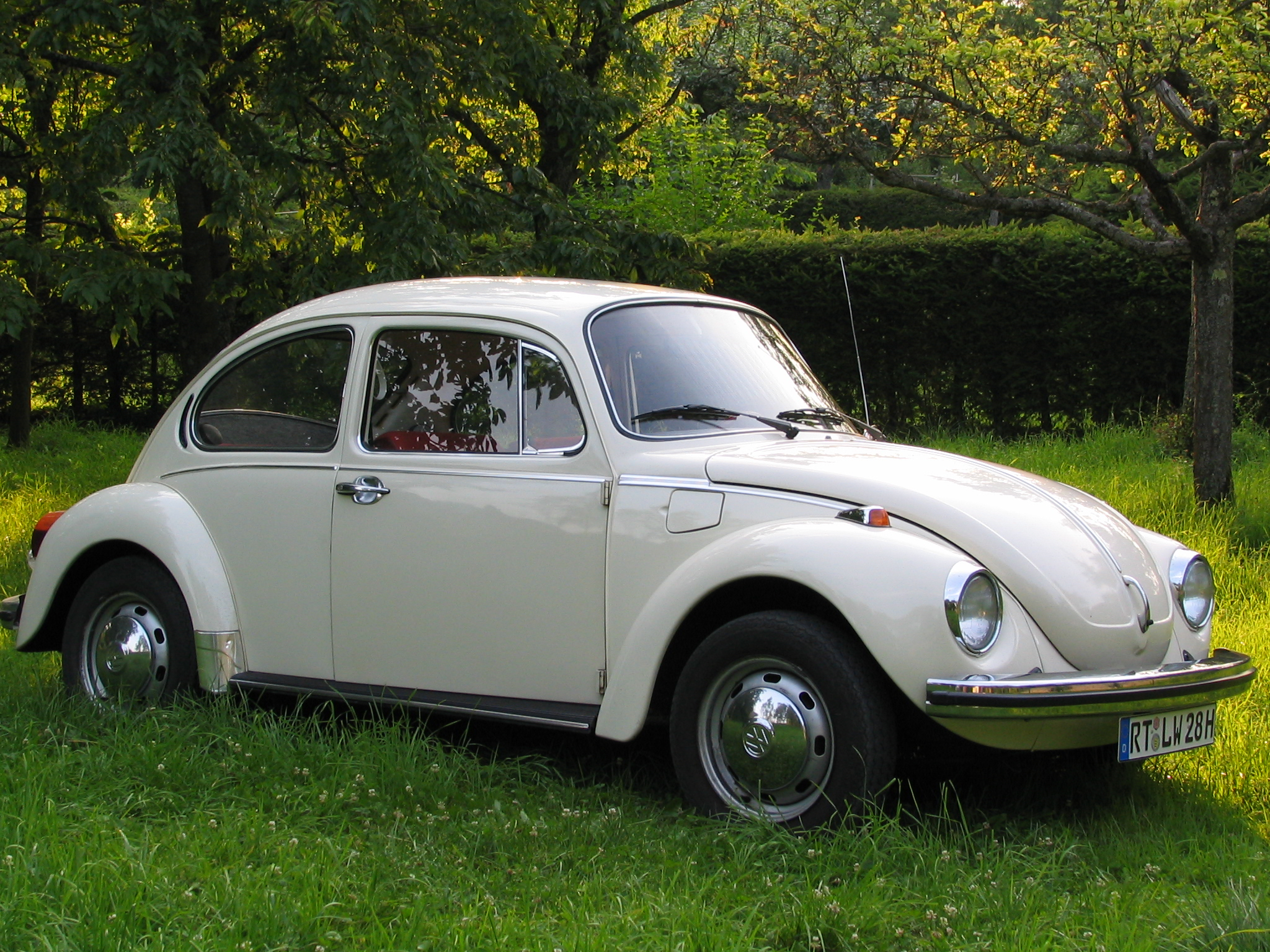 VW Käfer 1303 BJ 1974, Ansicht von vorne rechts